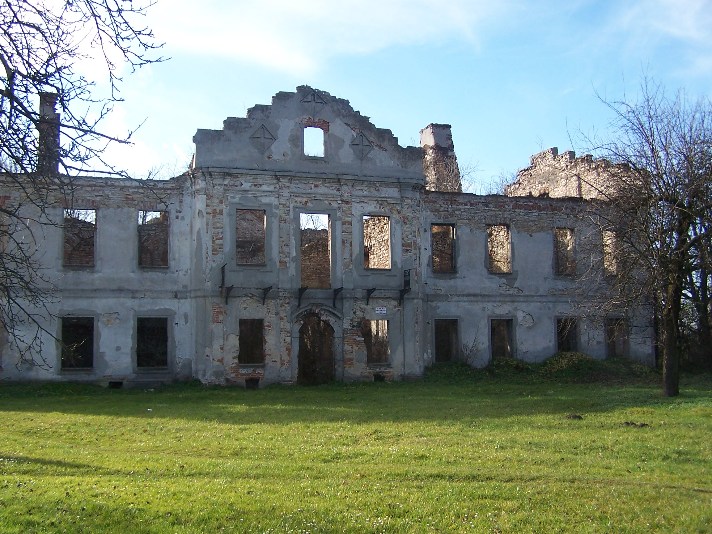 Fasada pałacu we Włodowicach